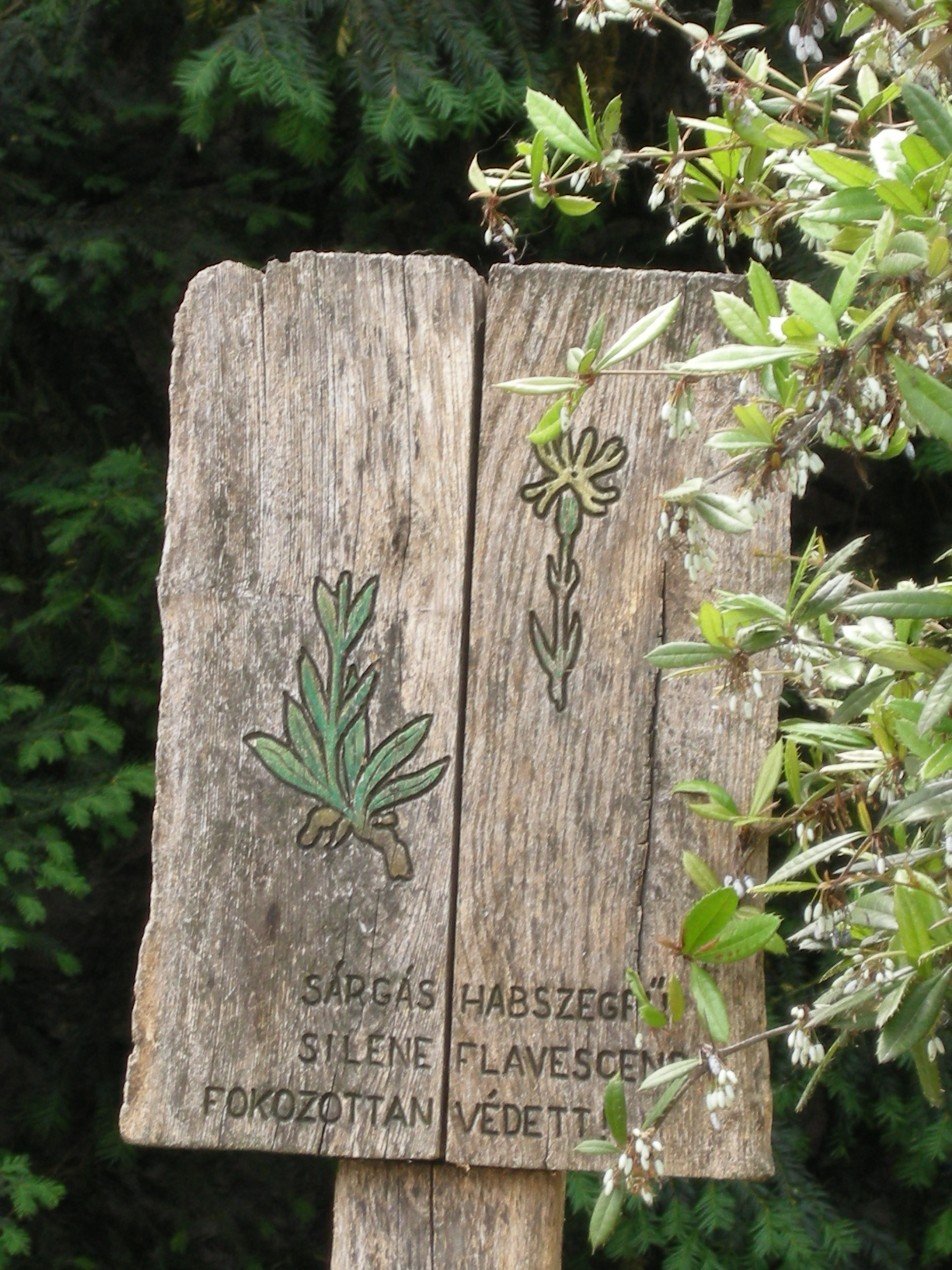 Budapest